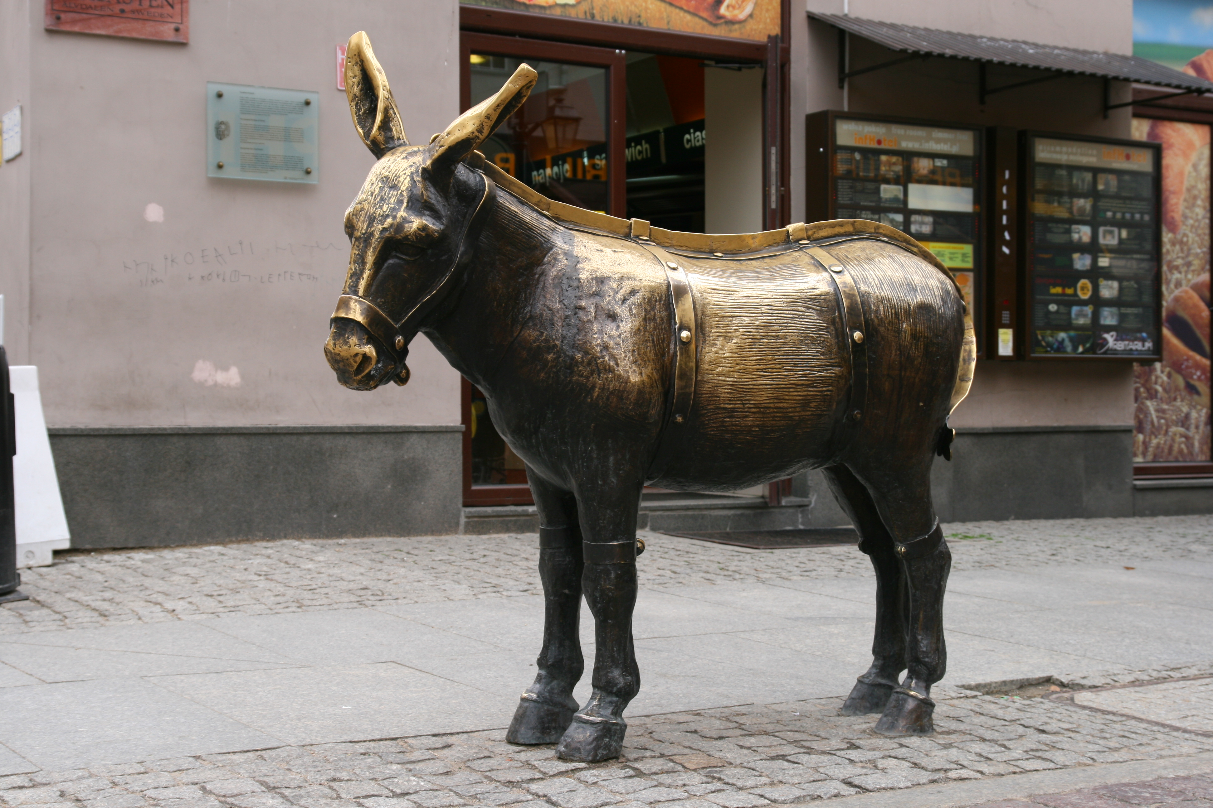 Pomnik osiołka na Rynku Staromiejskim u zbiegu ul. Żeglarskiej i Szerokiej w Toruniu. Figura będąca nawiązaniem do dawnego przyrządu do karania żołnierzy straży.